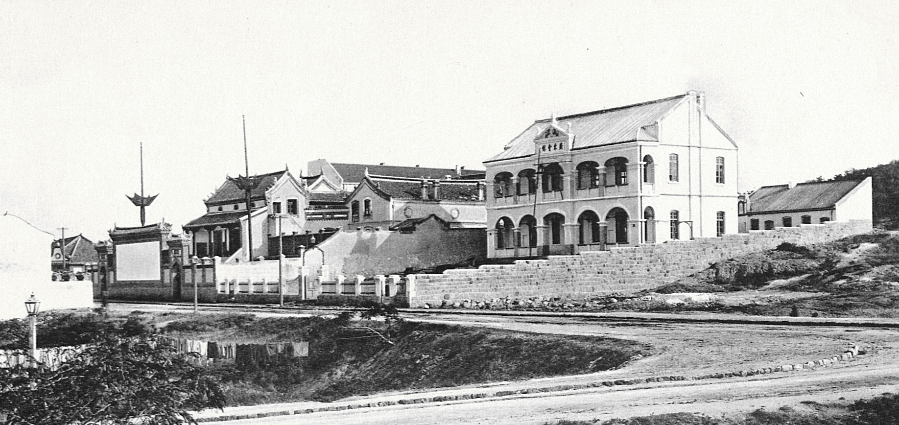 青岛广东会馆